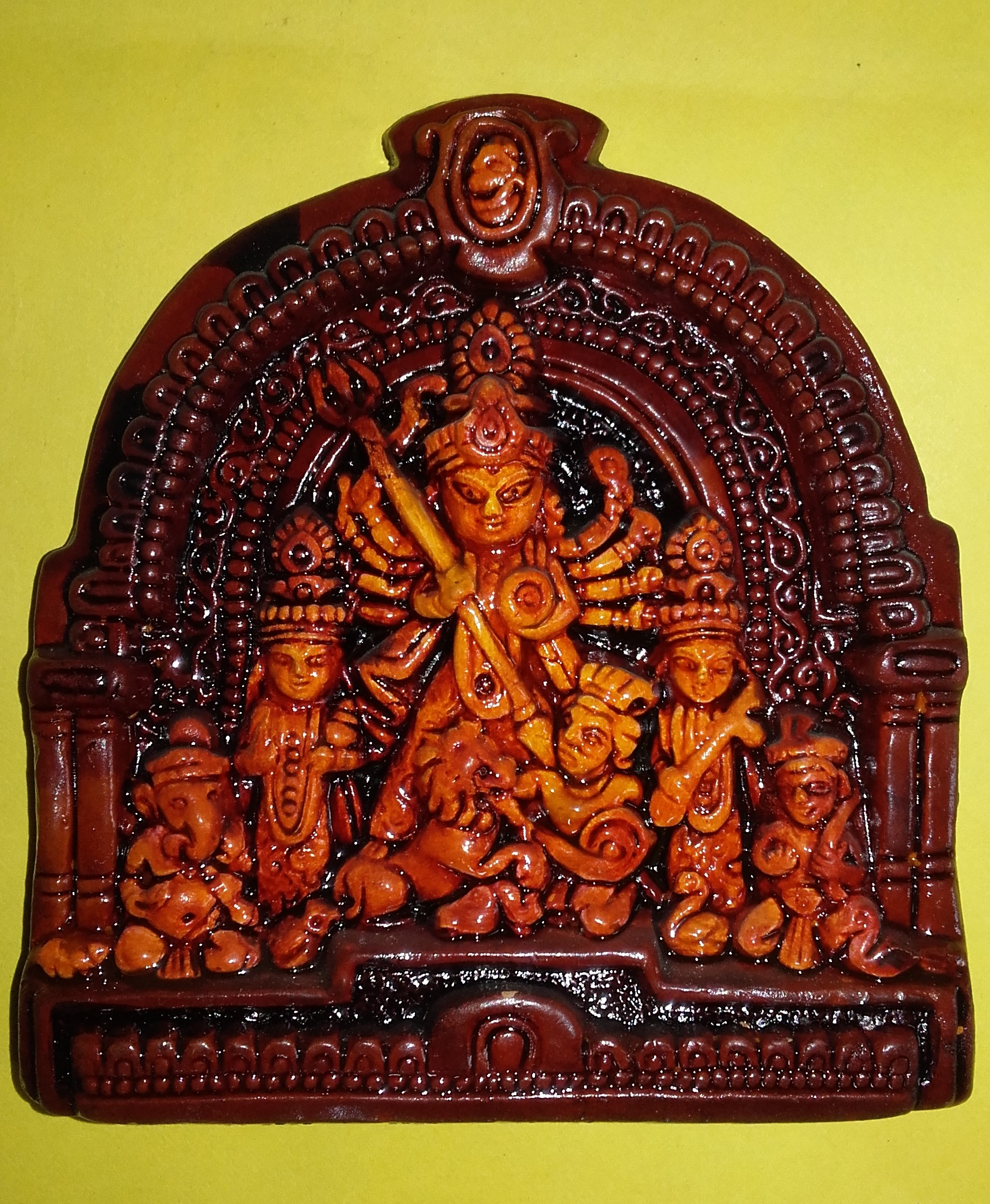 বাংলার মৃৎশিল্পের ছোঁয়ায় দেবী দুর্গা